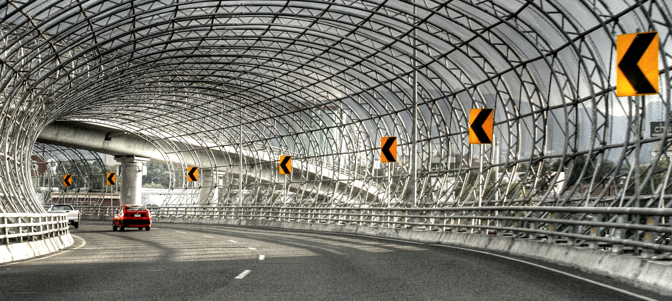 Segundo Piso del Anillo Periférico en San Jerónimo, México, D. F., México.